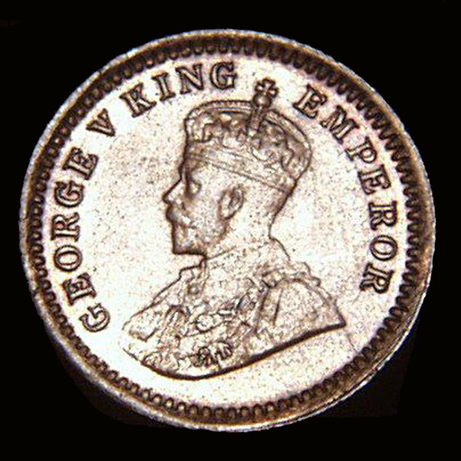 INDIA COINS GEORGE V KING EMPEROR LL.